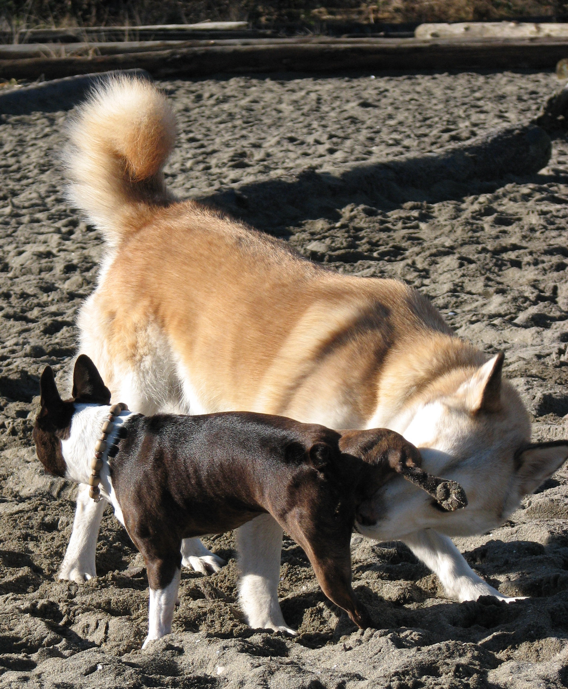 Shiba Inu meets Boston Terrier. At Hadden Park in Vancouver.